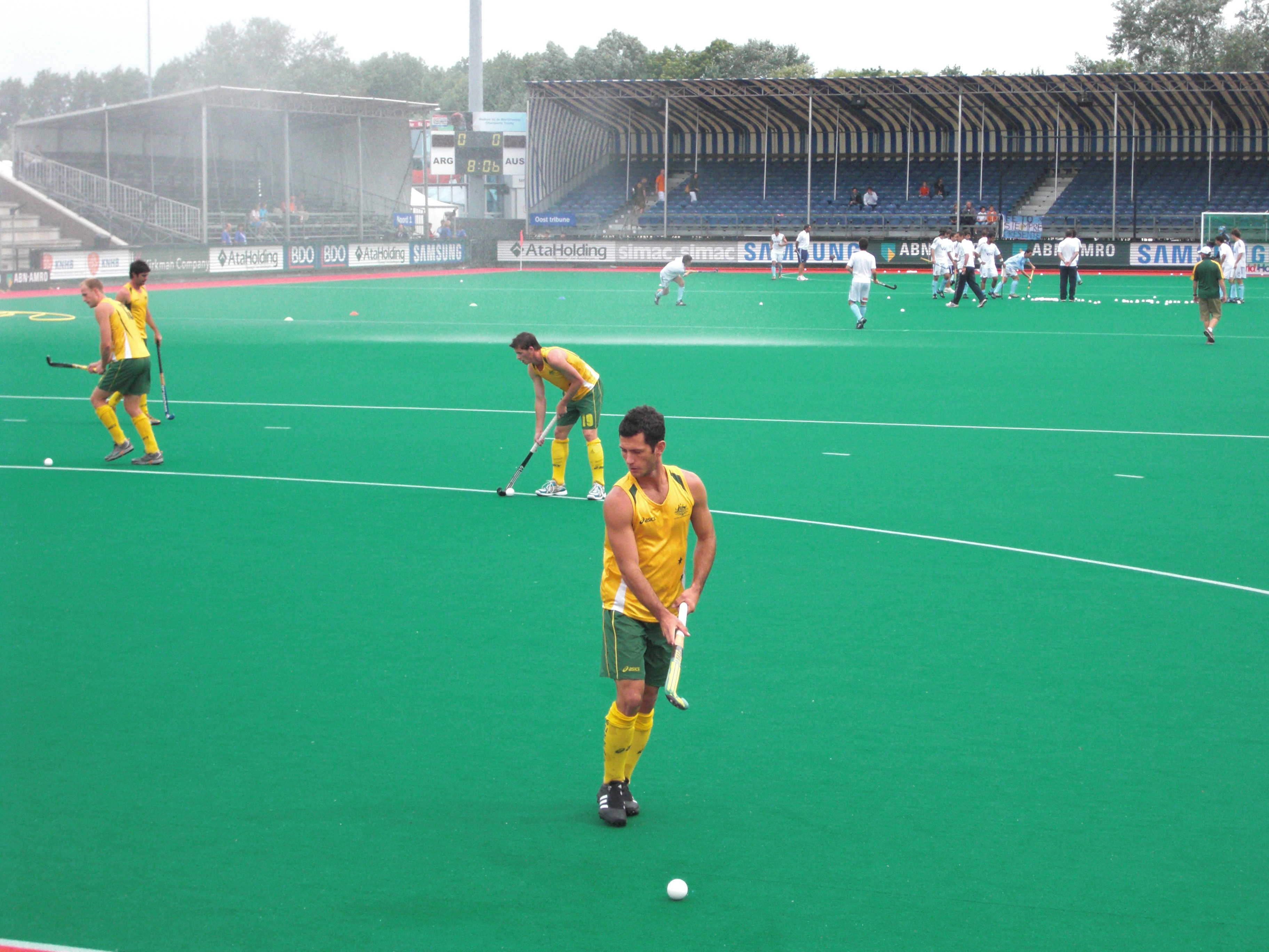 Jamie Dwyer à L'echauffement au trophée des champions 2008 avant le mach contre l'Argentine